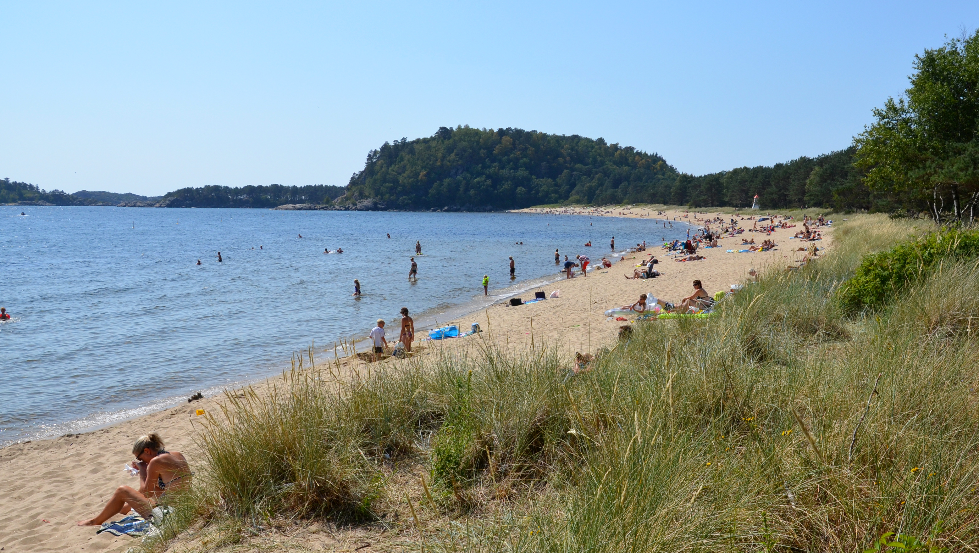 Sjøsanden beach i Mandal